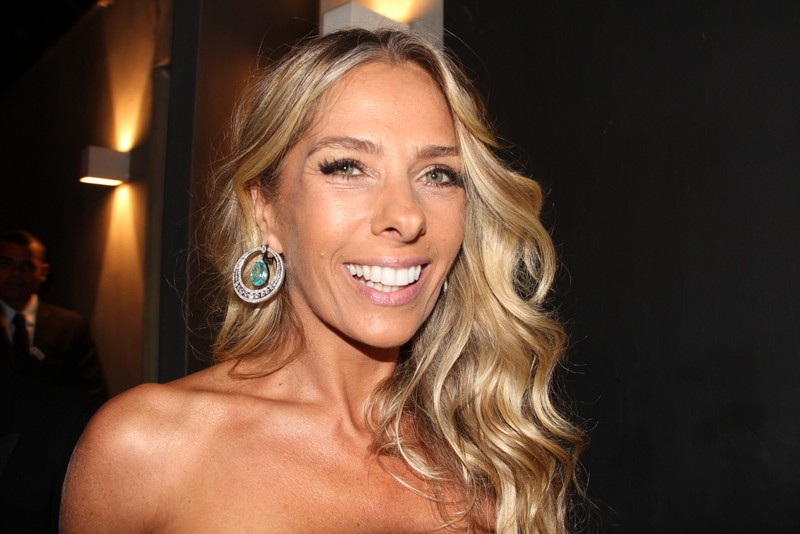 18 - Adriane Galisteu